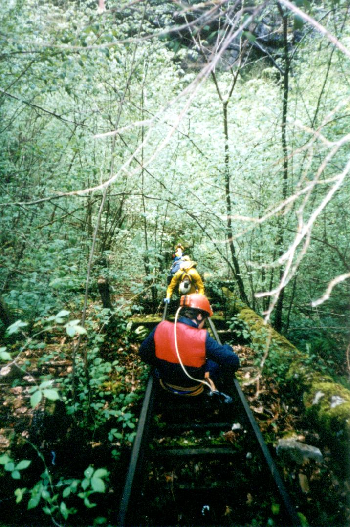 Descente des spéléologues sur les rails de la partie extérieure du Gouffre des Vitarelles|gouffre des Vitarelles. La végétation est dense.